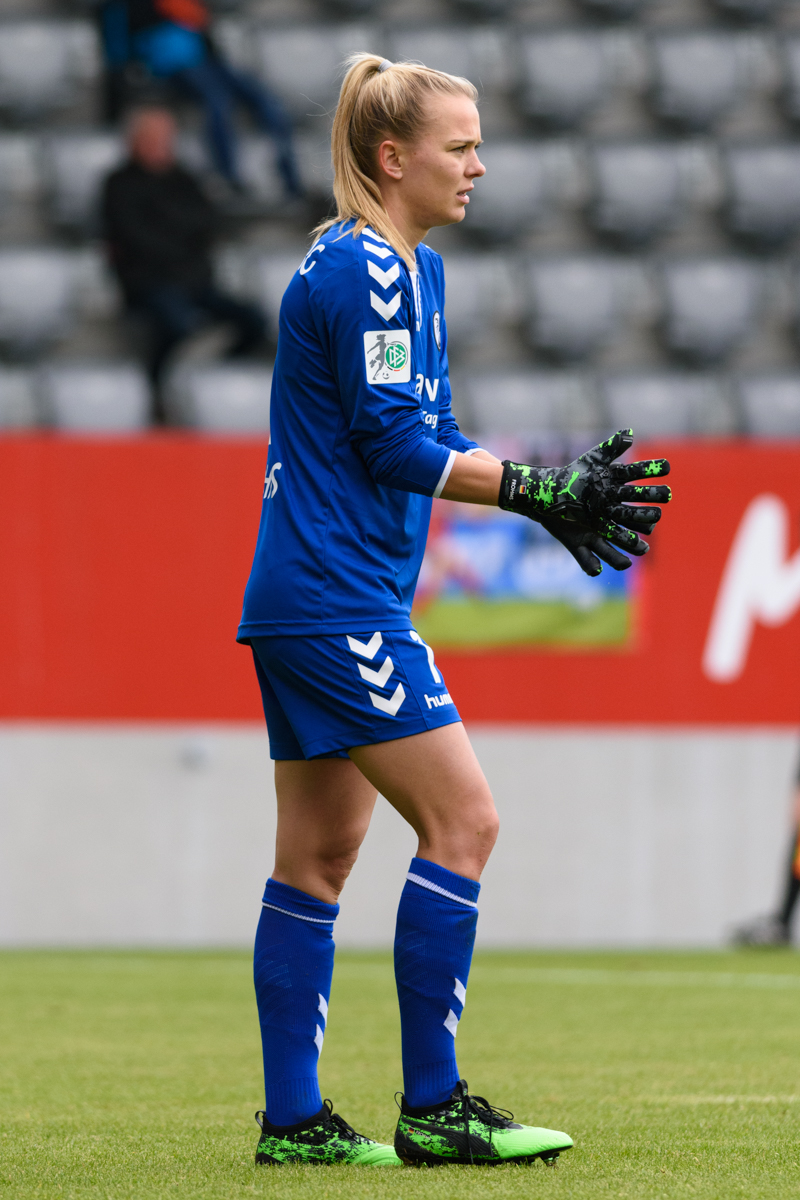 Merle Frohms during FC Bayern (women) vs SC Freiburg (women), May 2019